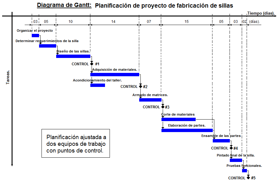 Ejemplo de Diagrama de Gantt, aplicado a procesos de fabricación.